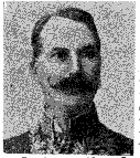 Carl Bildt (1850–1931), diplomat, författare och kammarherre, ledamot av Svenska Akademien.